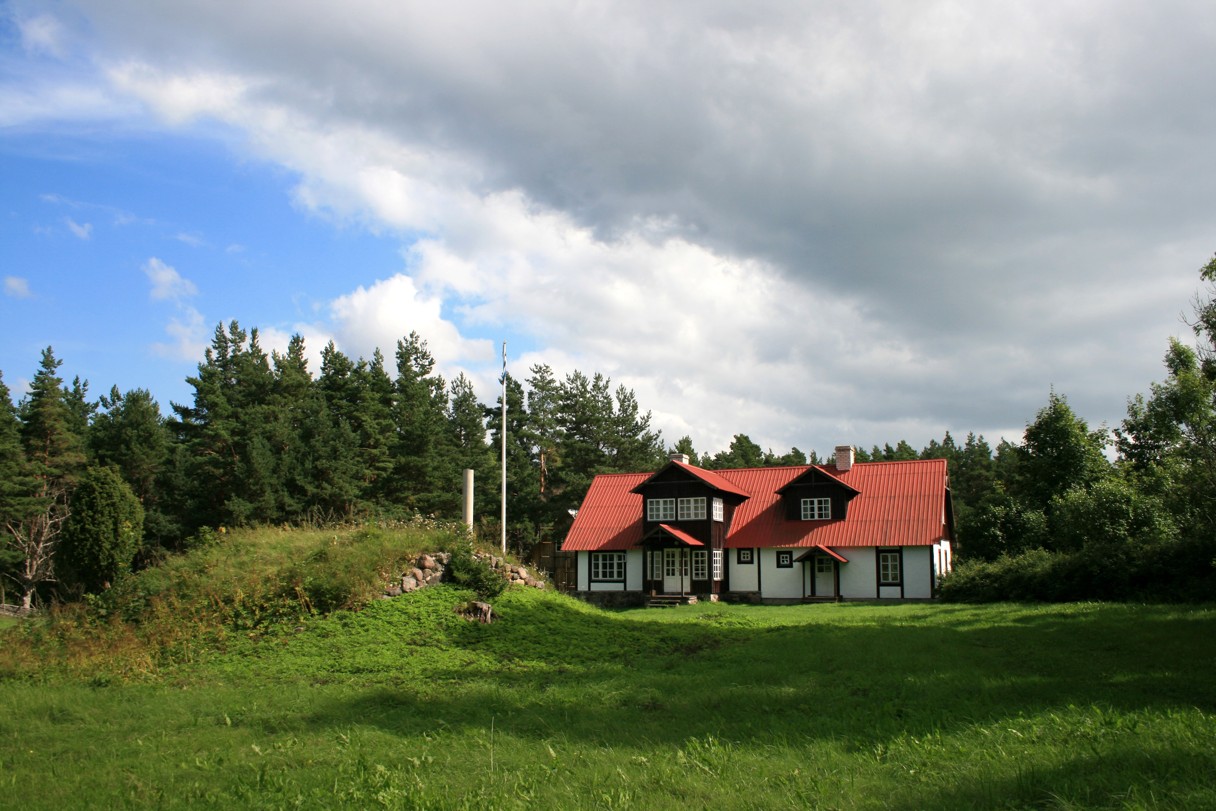 Hullo, Vormsi